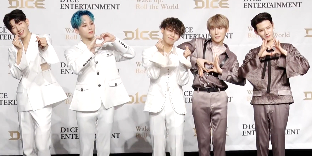 [Dispatch=김미류기자] 그룹 디원스(D1CE) 데뷔 미니앨범 '웨이크 업: 롤 더 월드(Wake up: Roll the World)' 발매 기념 쇼케이스가 1일 오후 서울시 강남구 삼성동 SAC아트홀에서 열렸다. '디원스'는 다양한 포즈를 취하며 포토타임을 가졌다. 시선을 이끄는 매력을 보여줬다. 디원스 #D1CE #우진영 #박우담 #김현수 #정유준 #조용근 #Woojinyoung #parkwoodam #kimhyunsoo #jungyoojun #joyonggeun #wakeuprolltheworld #웨이크업롤더월드 #첫번째미니앨범 #데뷔 #데뷔무대 #쇼케이스 #포토타임 #깨워 #디스패치 #Dispatch 디스패치 구독 클릭! Dispatch Subscribe